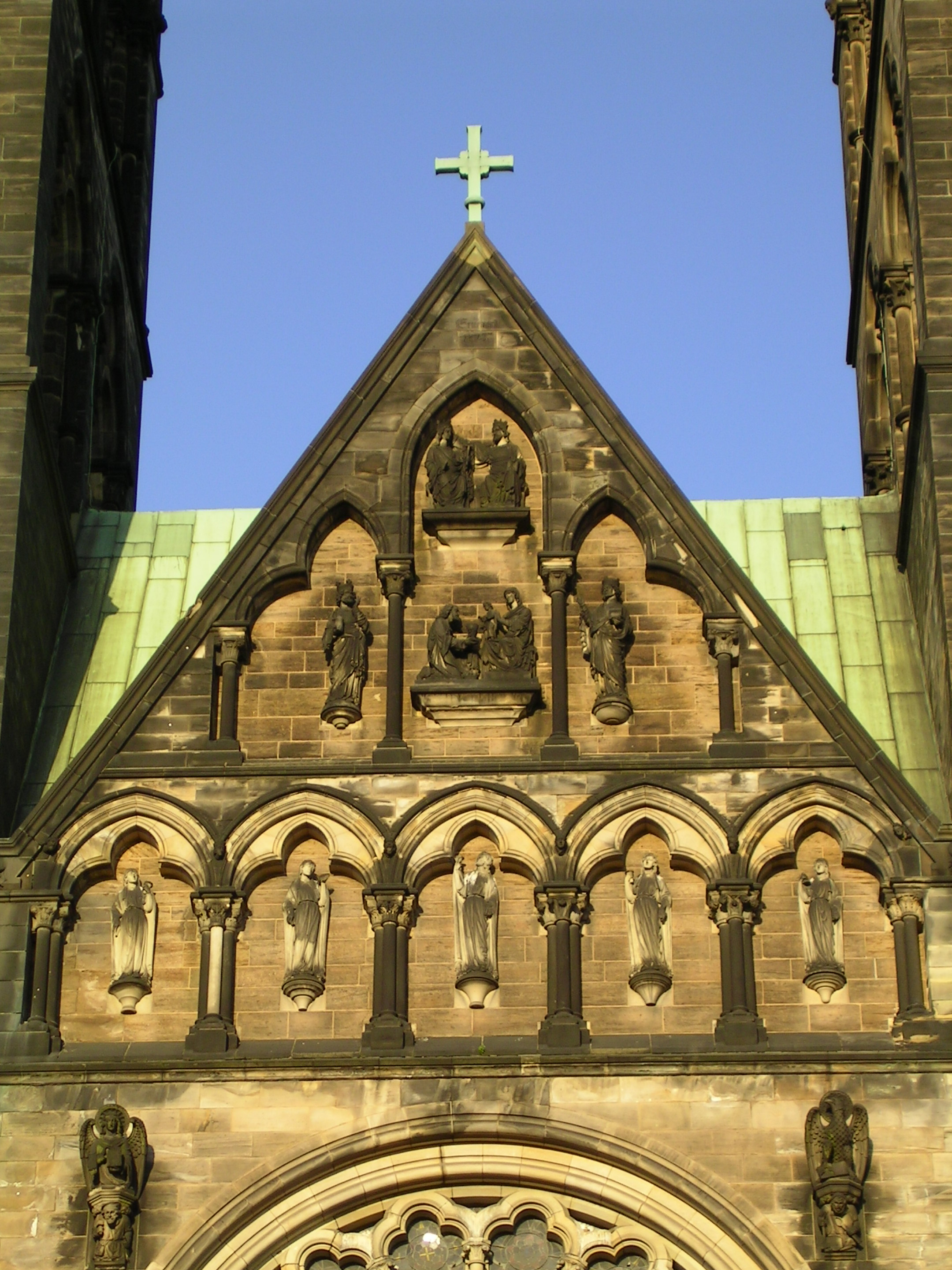 ST. Petri Dom